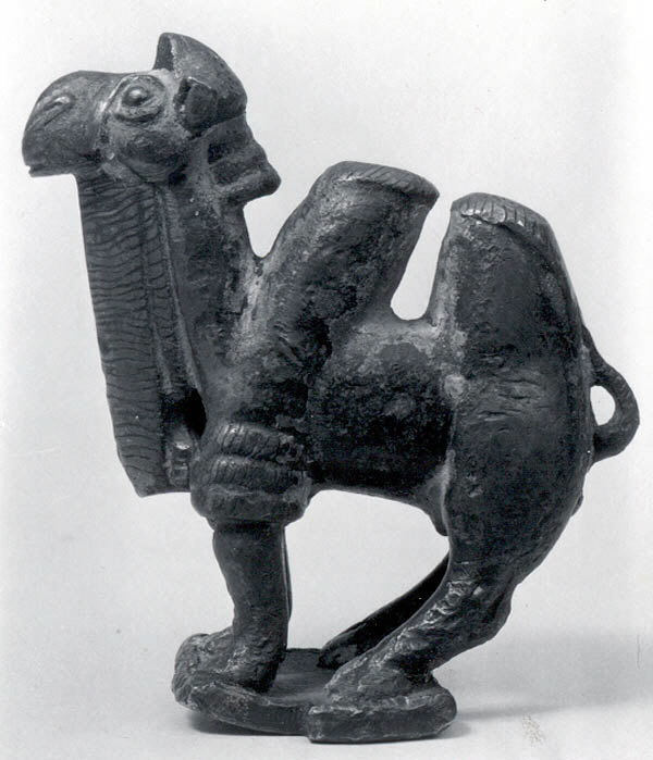 Bactria-Margiana Archaeological Complex; Sculpture; Metalwork-Sculpture